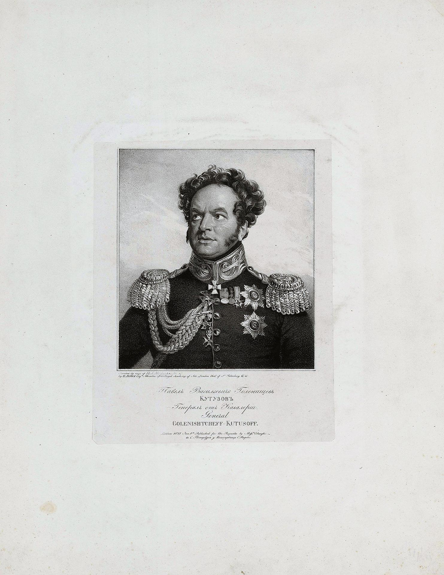 Портрет генерала П. В. Голенищева-Кутузова